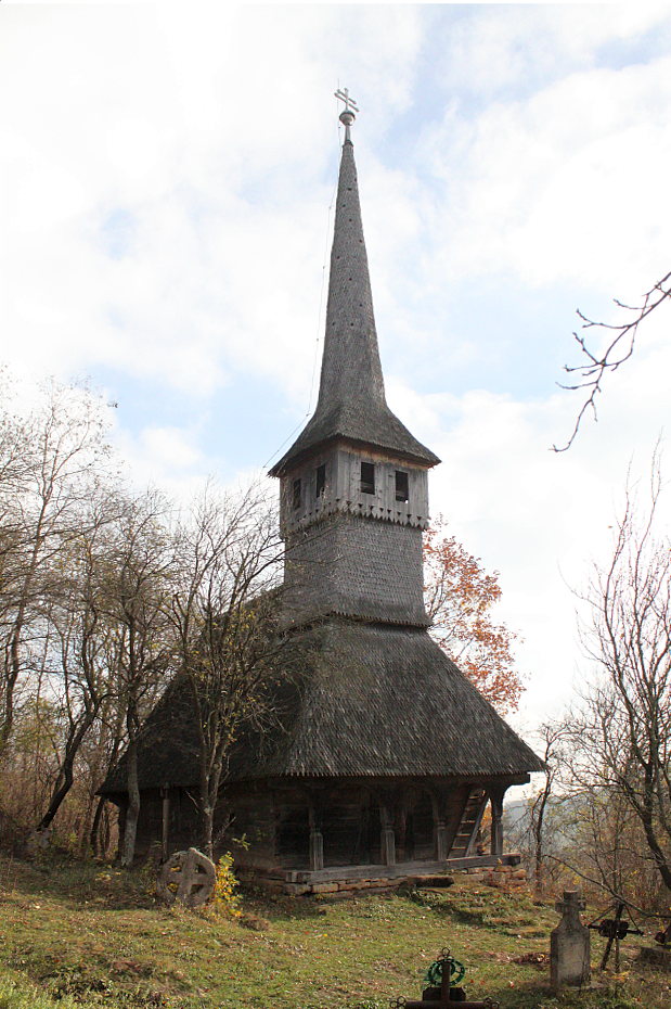 Biserica de lemn din Inău, județul Sălaj.